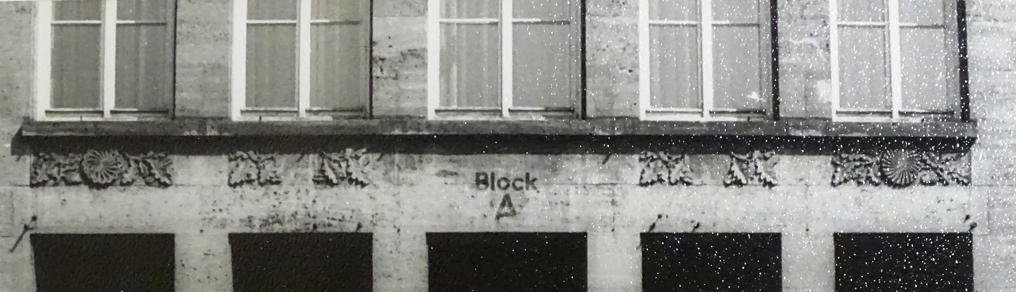 Hauptportal Block A (Ausschnitt), ehemalige Militärakademie "Friedrich Engels", Dresden-Strehlen, August-Bebel-Straße.